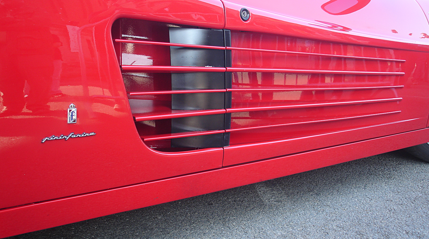 Ferrari Testarossa exposat al festival Martini Legends (commemoració del 75 aniversari del Circuit de Montjuïc)